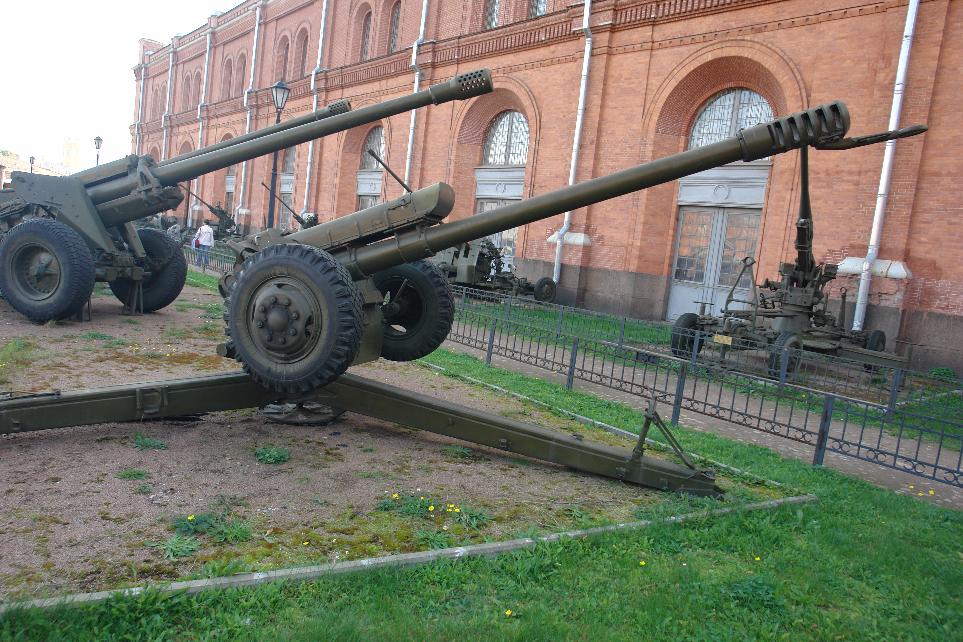 122mm Haubitze D-30 (2A-18) Chef-Designer FF Petrov (1960). Reichweite : 15300m Kadenz : 6-8 Schuß/min. Gewicht : 3200, Geschoßgewicht: 22 kg Bedienung : 6 Soldaten Quelle : Militär-Historisches Museum der Artillerie, Ingenieure und Signal Corps, St. Petersburg.